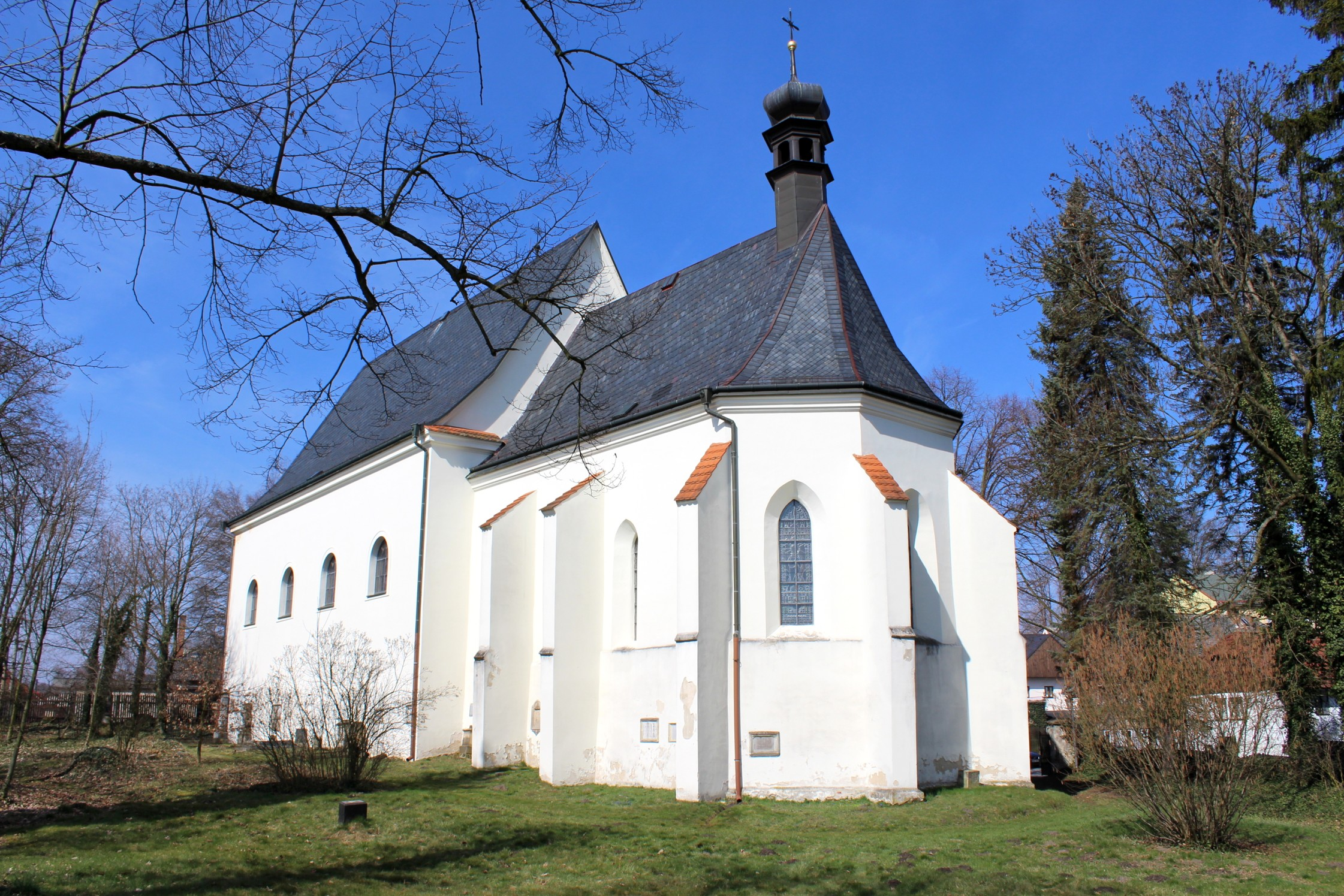 Bělá, kostel Povýšení sv. Kříže